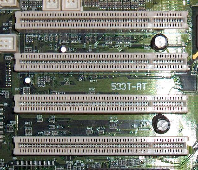 Buses PCI de una placa Pentium I Foto tomada por Jorge González. BUS PCI